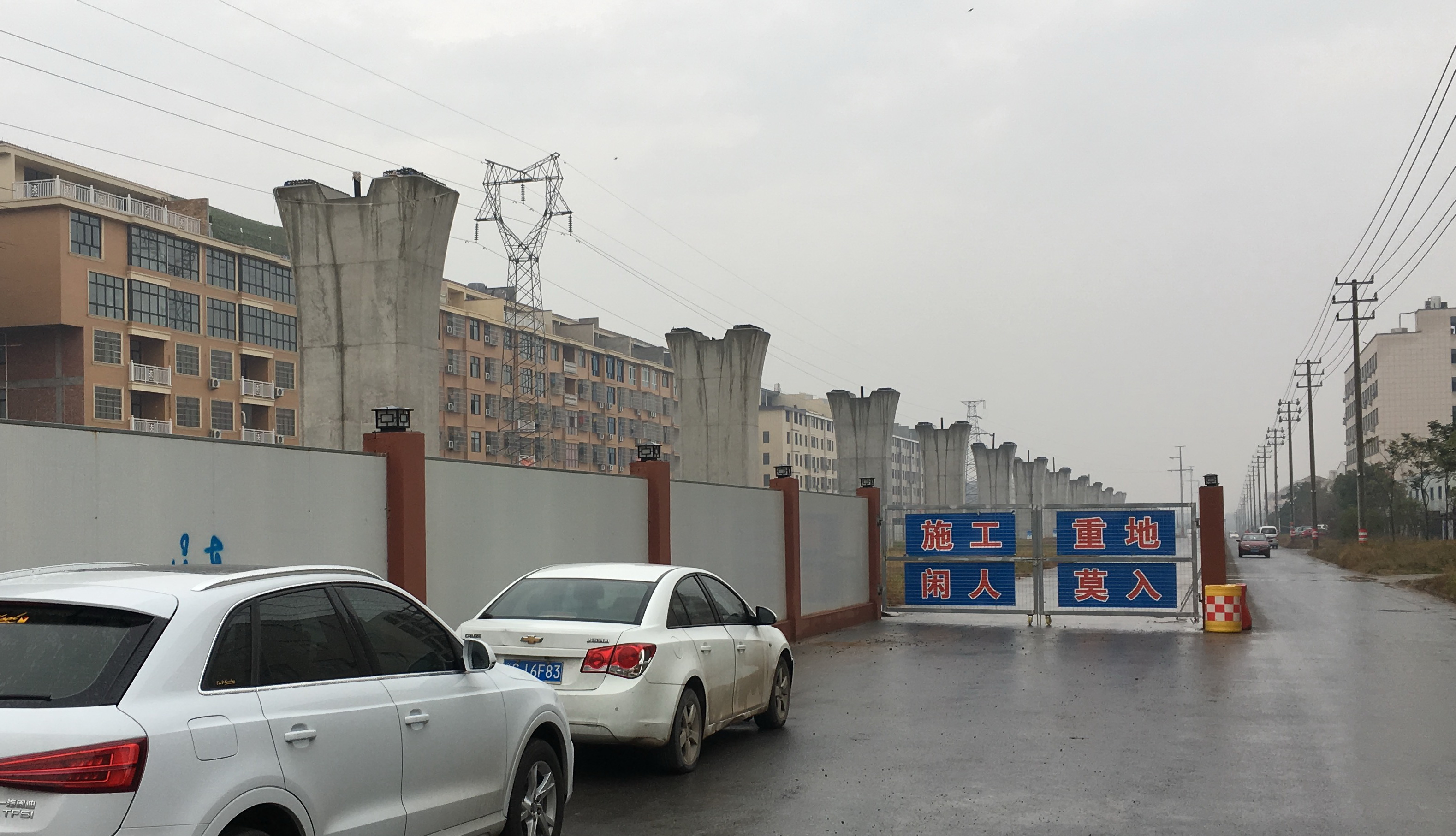 中文（中国大陆）: 浙江省金华市金义东轨道试验段施工场地。